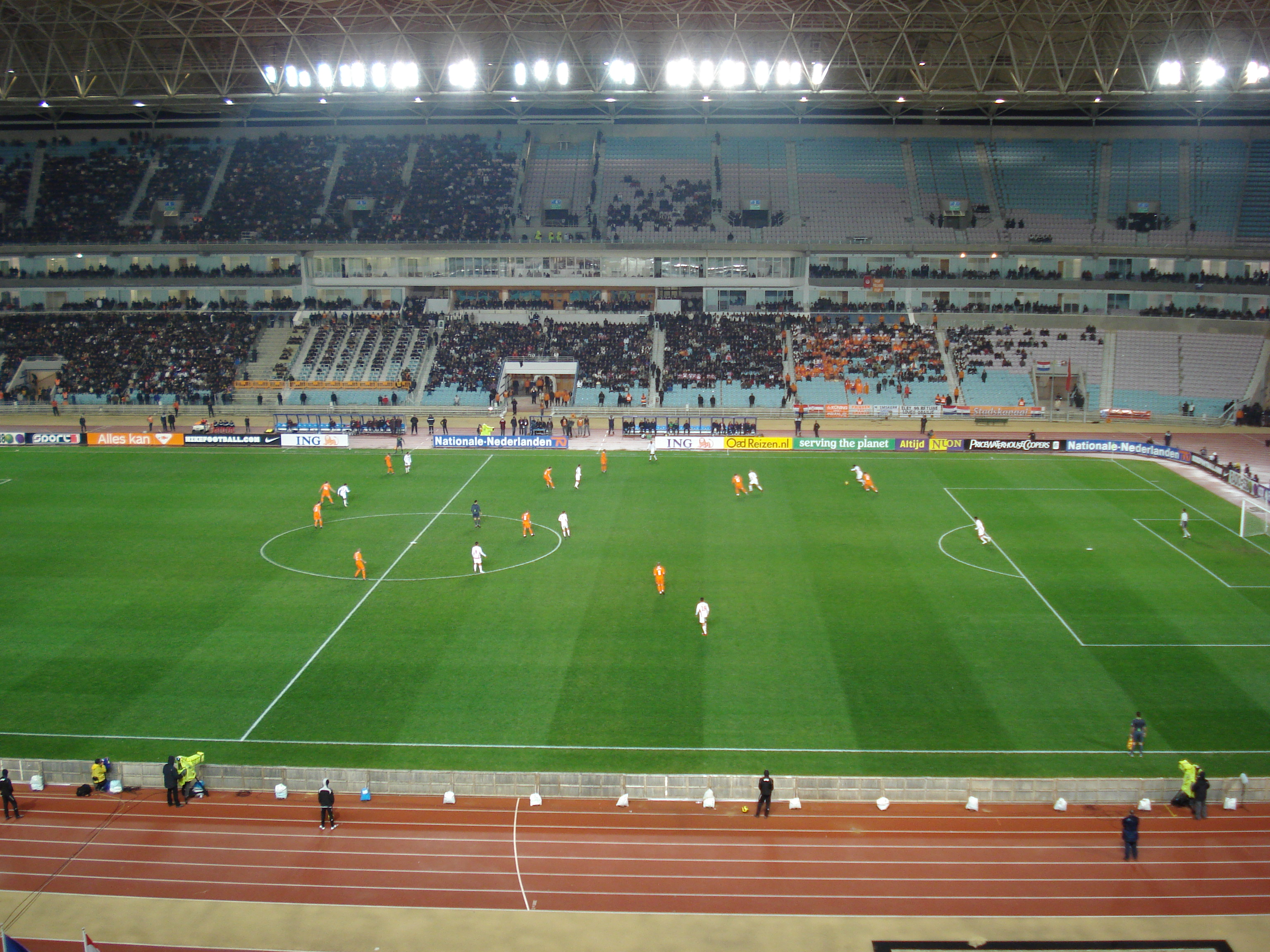 Tunisie - Pays-Bas (1-1), Stade de Radès, Tunis, Tunisie